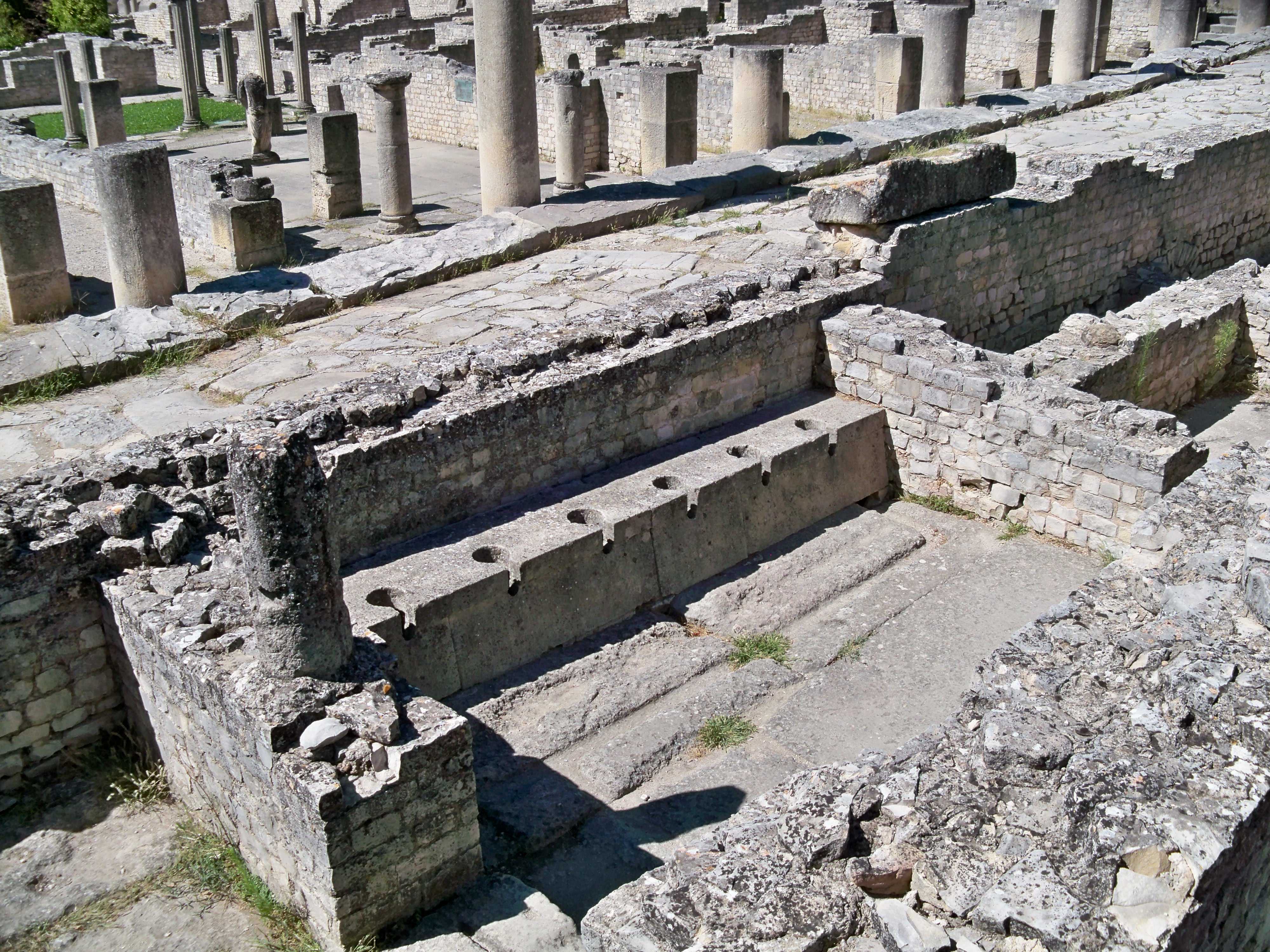 Site archéologique La Villasse à Vaison La Romaine (84) .